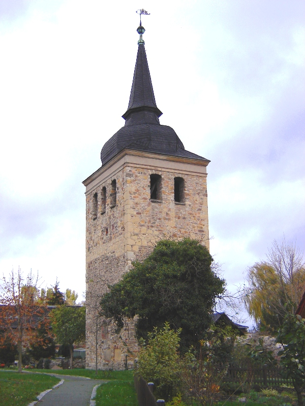 Stephanusturm in Magdeburg-Westerhüsen